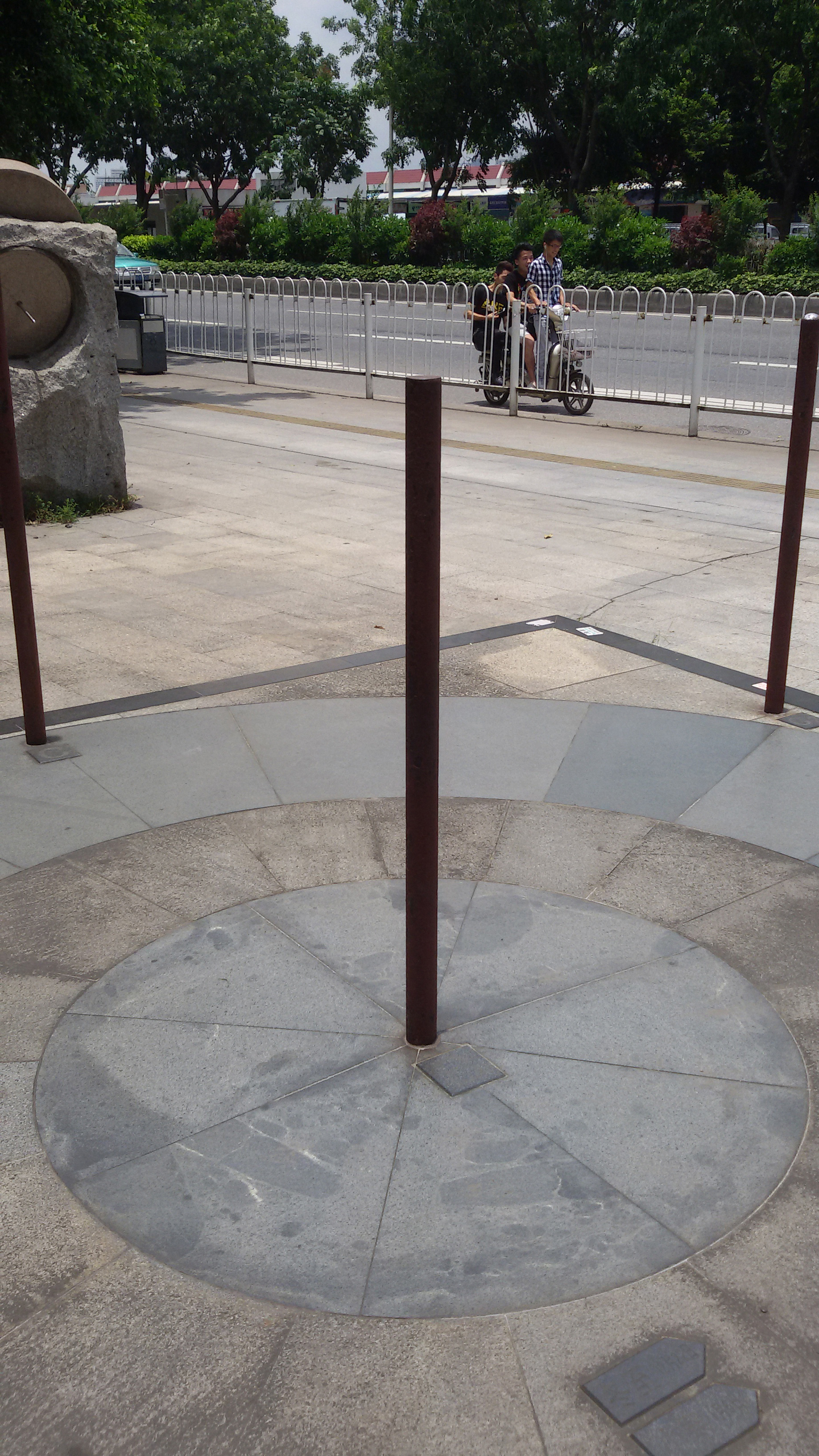 粵語: 喺2015年6月11号12点26分出现嘅立竿无影现象（广州花地湾地区）